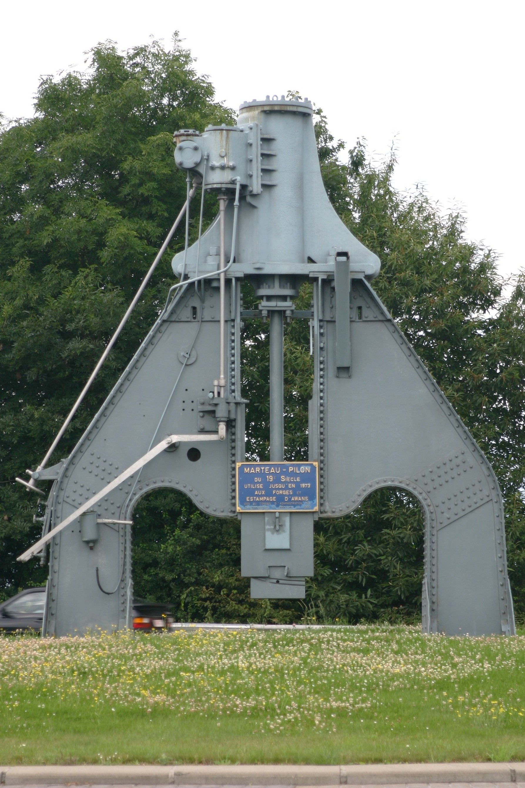 Marto-Pillo um Rond-Point vun der Nationale 3 zu Hognoul, bei Awans an der Provënz Léck.